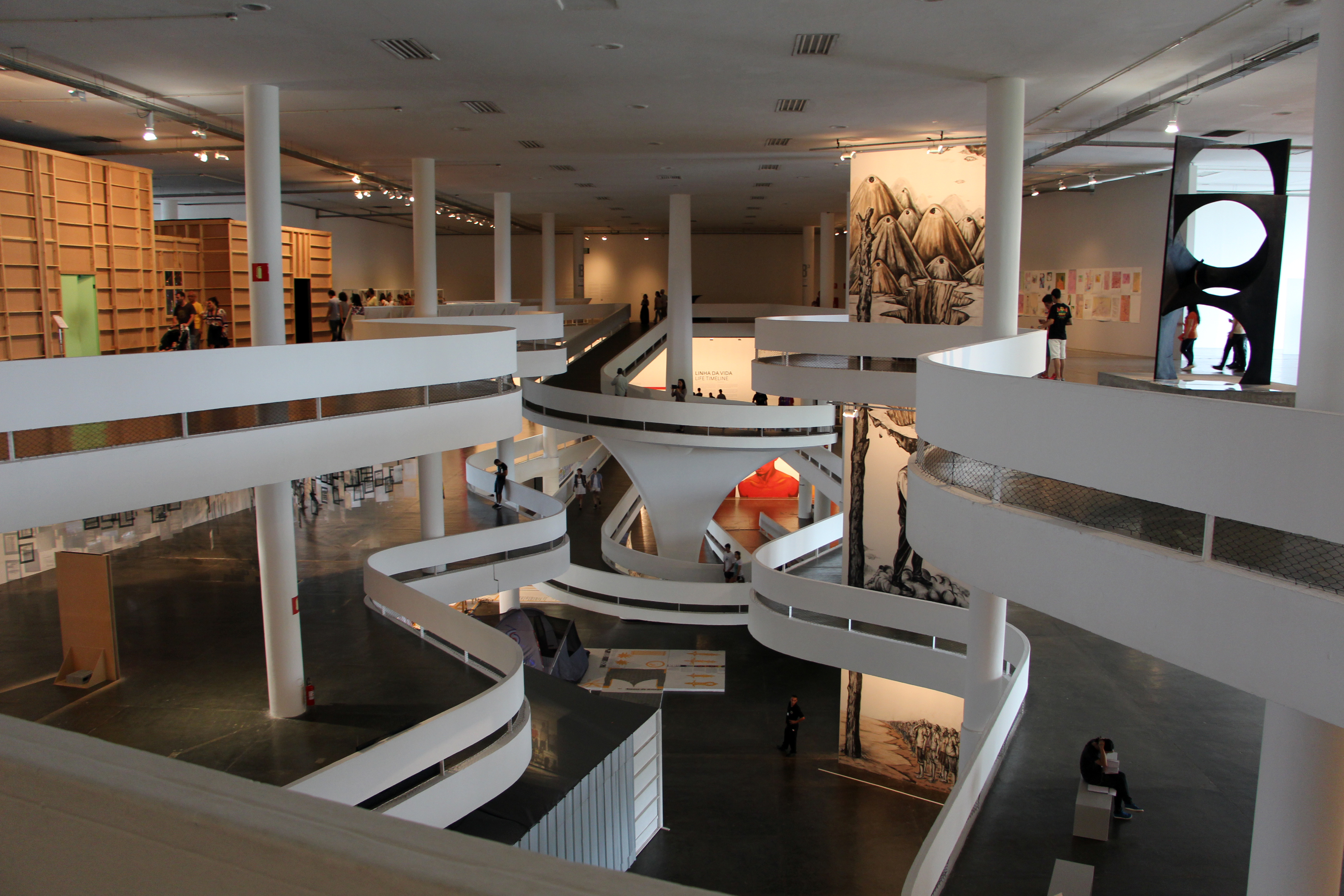 Ibirapuera San Paolo